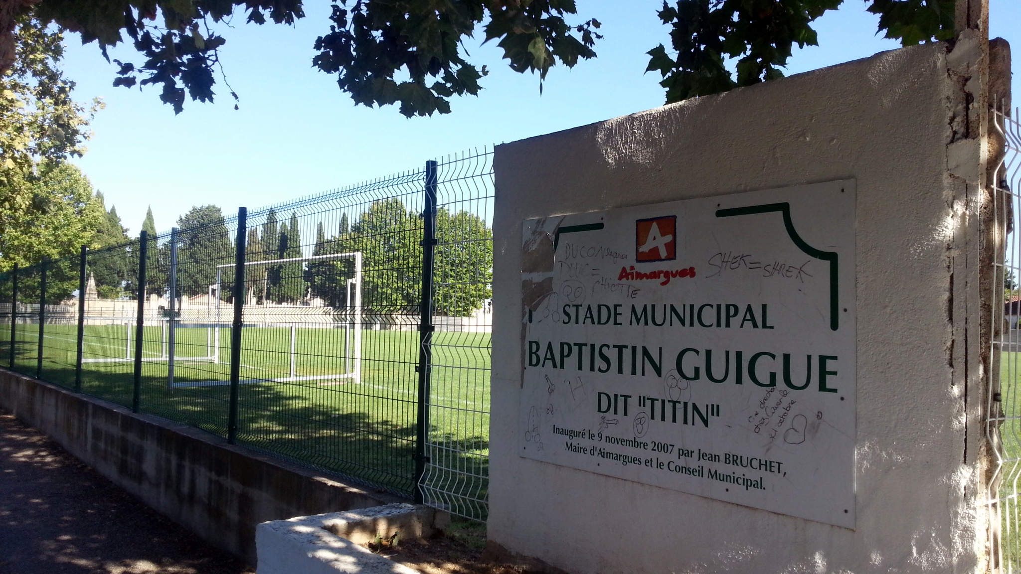 Stade Municipal Baptistin Guigue dit "Titin" à Aimargues